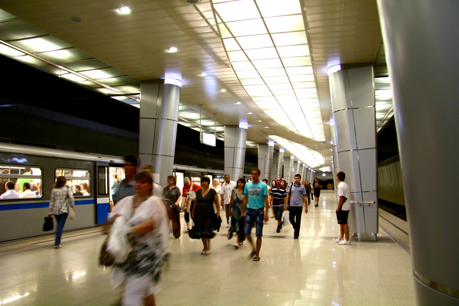 Kazan Metro (Казанский метрополитен)